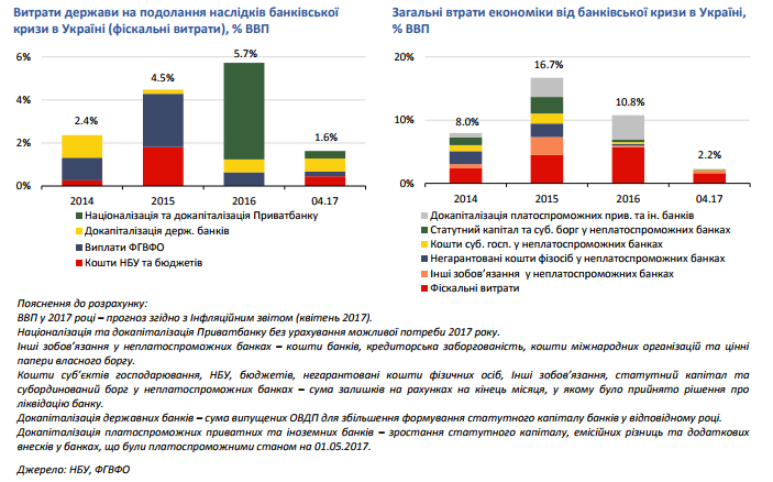 Витрати держави на подолання наслідків банківської кризи в Україні (фіскальні витрати), у % до ВВП та Загальні втрати економіки від банківської кризи в Україні, % ВВП